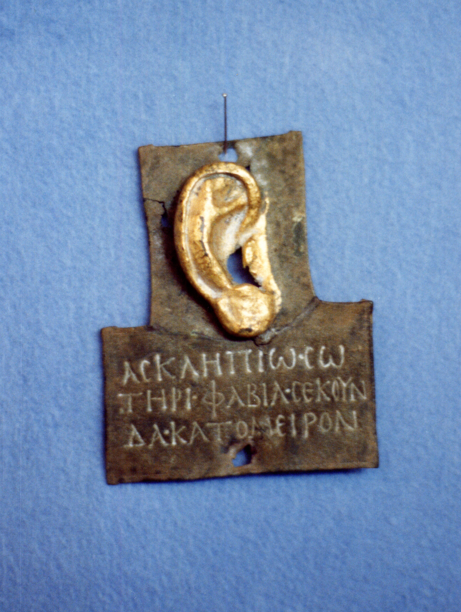 Museum Bergama, Türkei, "Goldenes Ohr", Votivgeschenk, hellenistisch